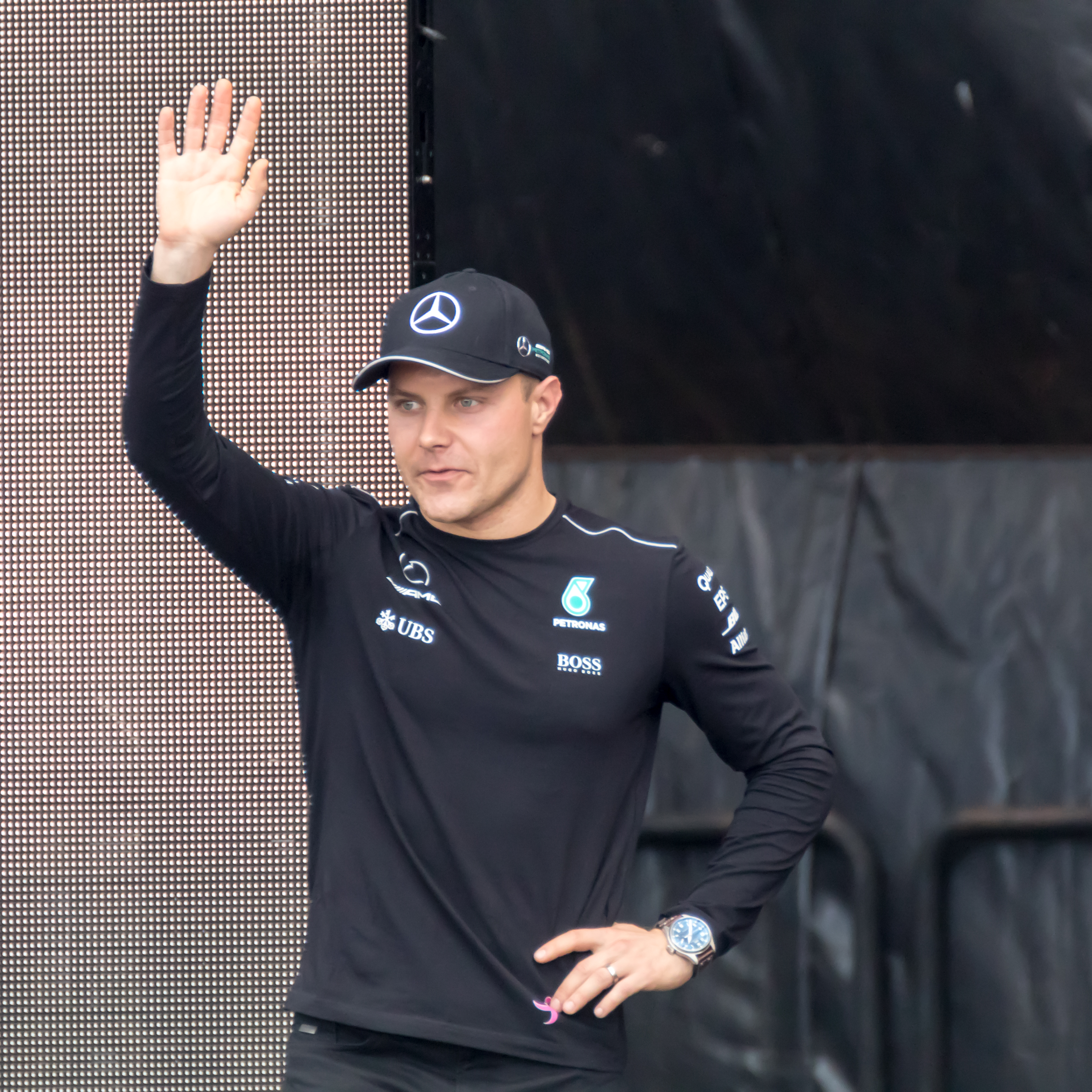 Valtteri Bottas interview